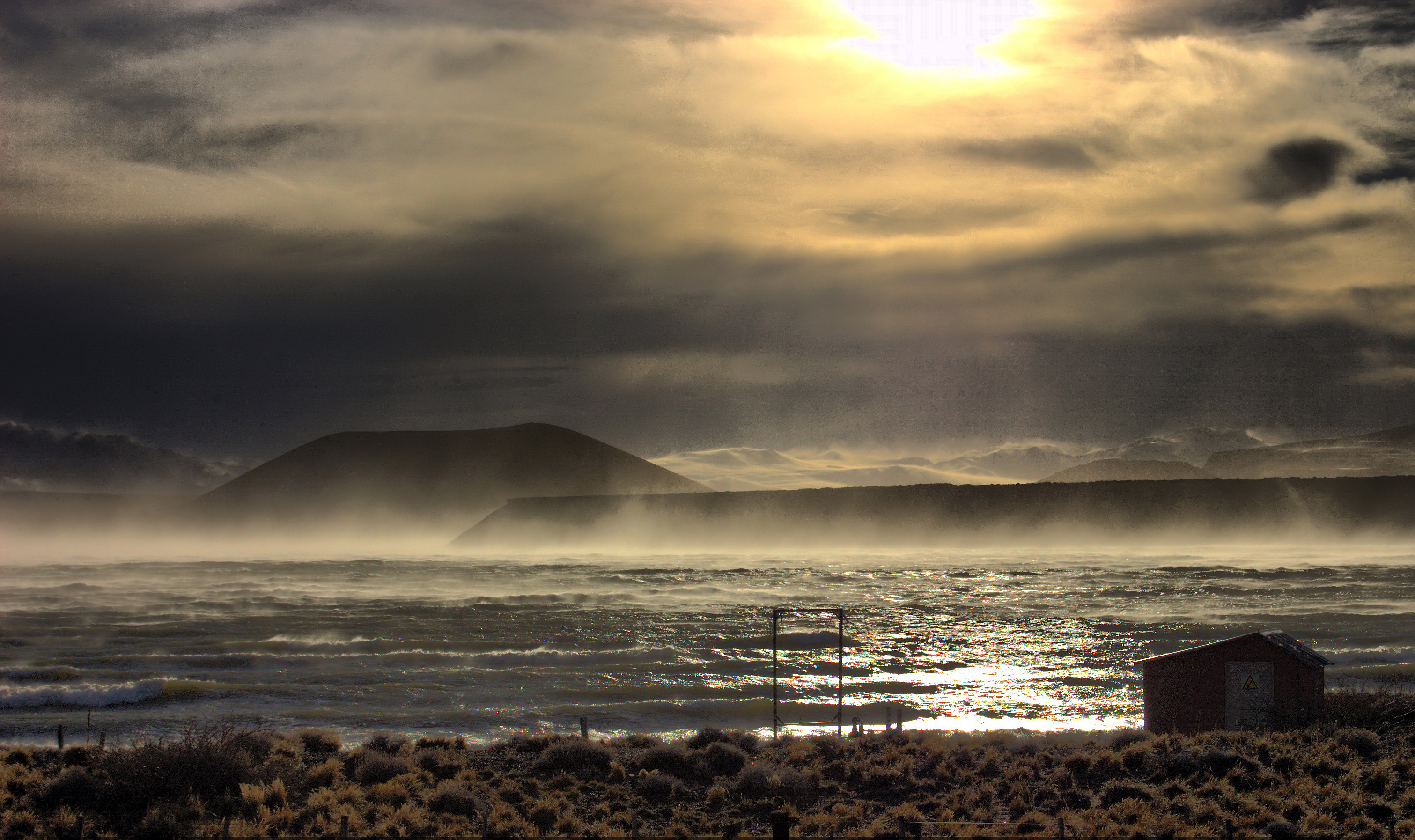 Laguna Blanca, Neuquén, Argentinien